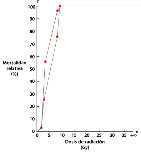 Mortalidad de la radiación en seres humanos. La línea roja representa la mortalidad relativa con humanos expuestos a la radiación y sin cuidados médicos posteriores. La línea verde representa la mortalidad relativa con humanos expuestos a la radiación y con cuidados médicos posteriores. Los puntos rojos representan cada dato disponible.